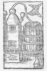 Alambic avec système de refroidissement par serpentin passant dans un tonneau d'eau froide. (Quatre livres des secrets...Livre III, chap.17, Jean Liébault)